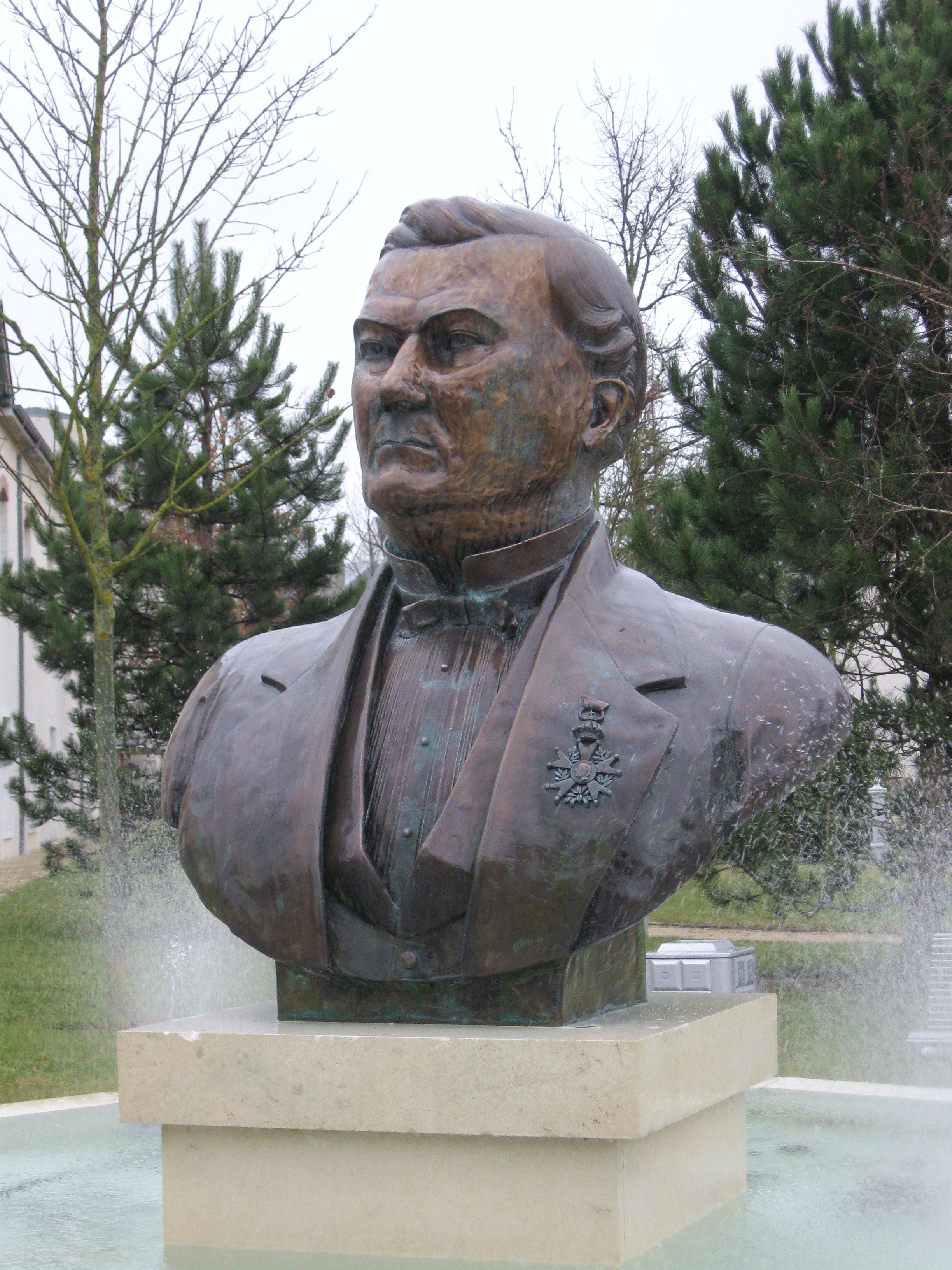 Buste de Célestin Gérard et fontaine dans les Jardins de la Française, Vierzon, Cher, France